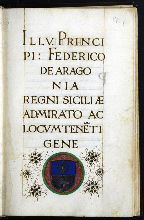 Escut de Paolo Paladini